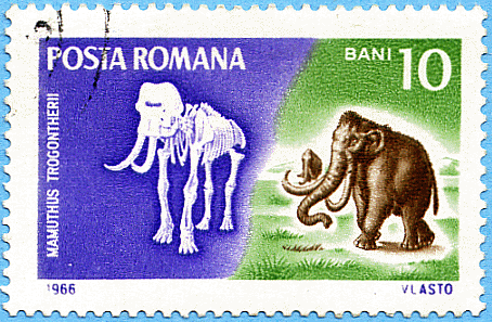 Source: Post of Romania